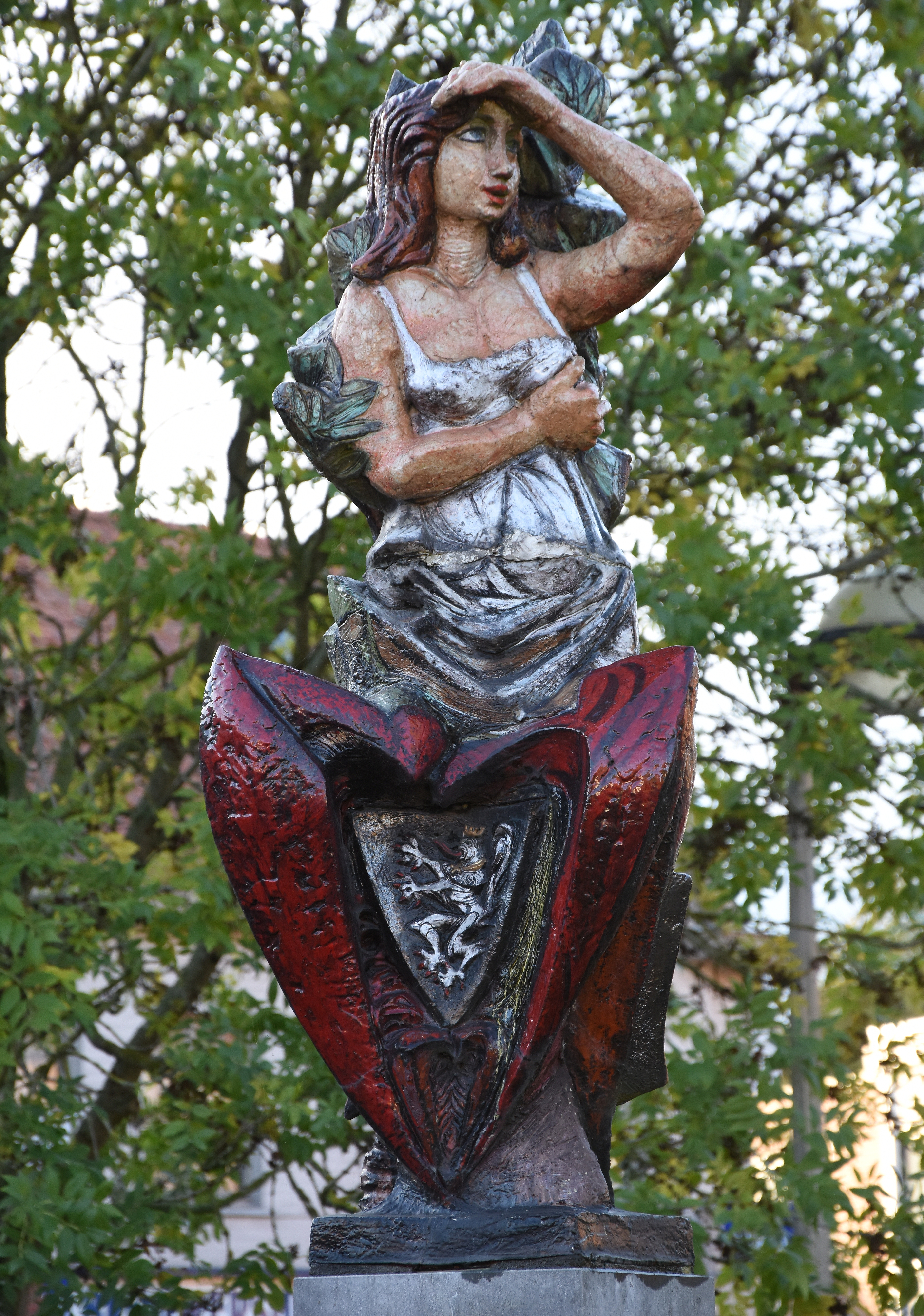 Mariakerke (oost-Vlaanderen) op het Claeysplein - Zomerlief (van Achiel Pauwels 1932)